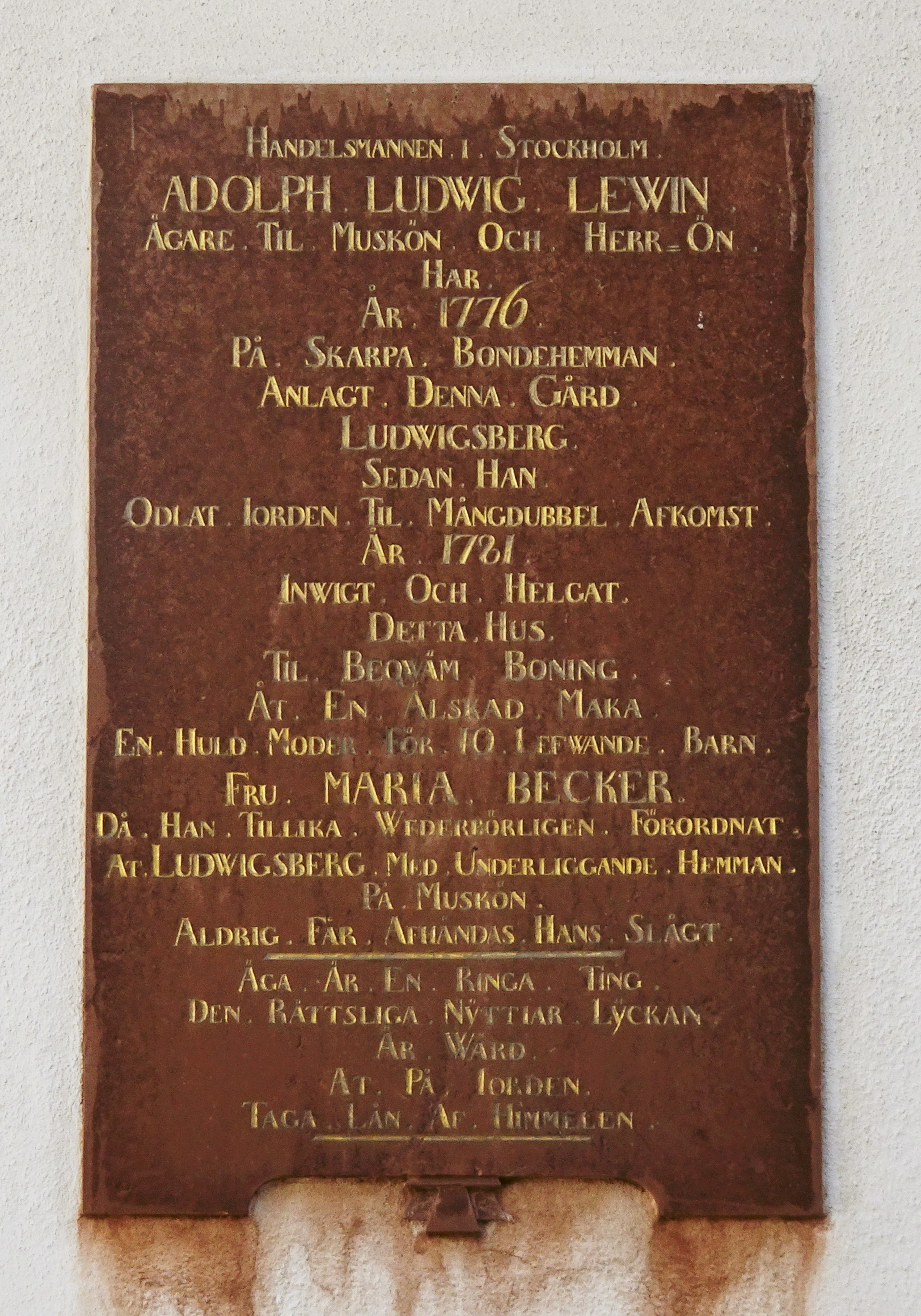 Ludvigsbergs herrgård, Muskö (minnestavla på fasaden)